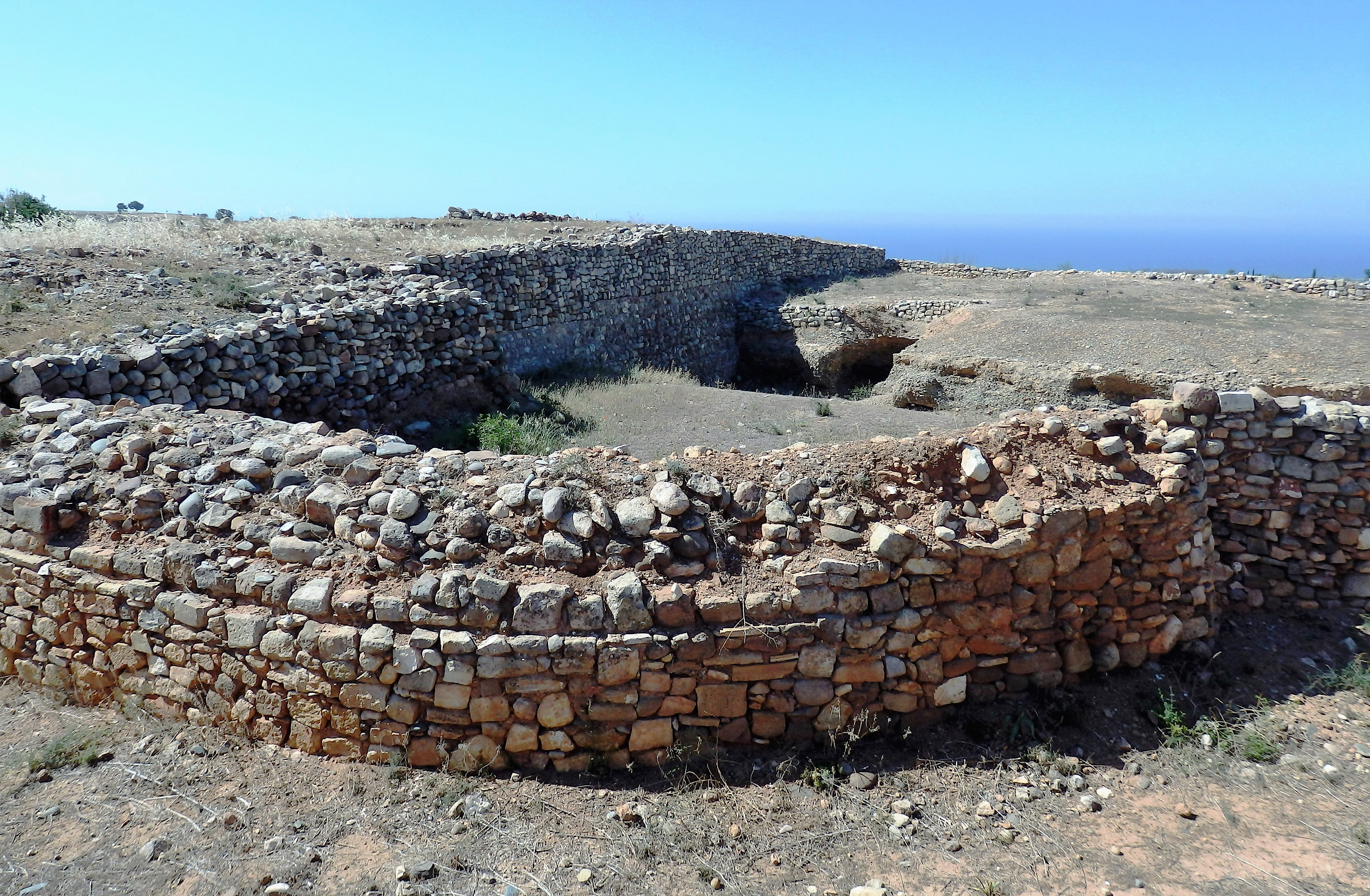 Blick ins Innere der Festung